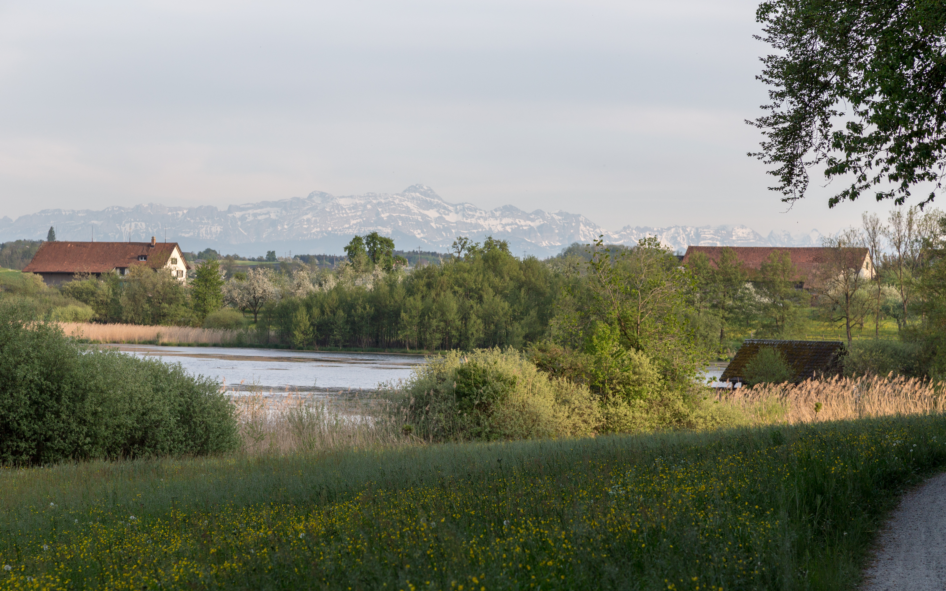 Bommer Weiher mit Säntisblick